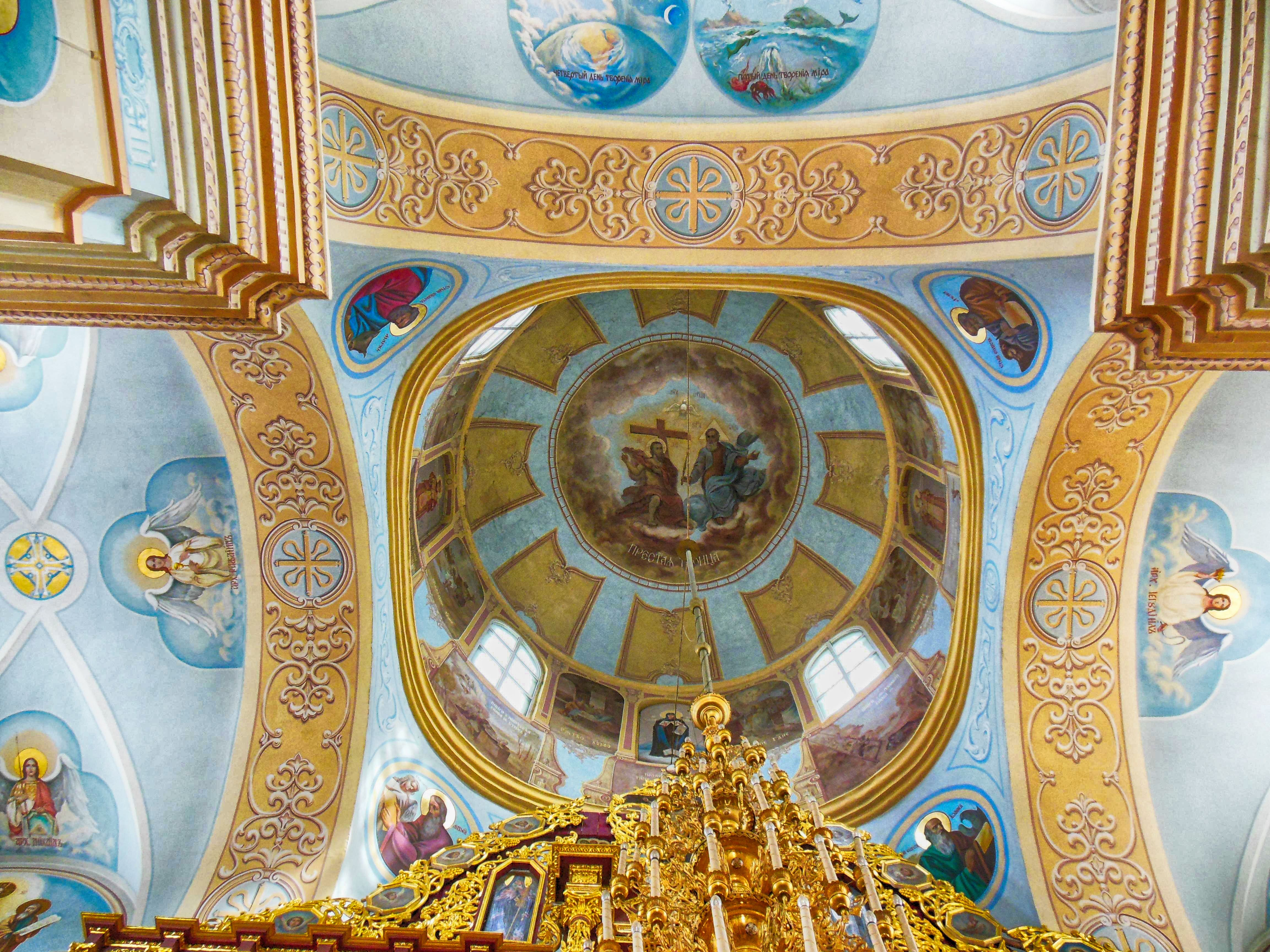 Беларуская (тарашкевіца): Комплекс Мікольскага манастыра ў межах агароджы:званіцажылы дом (шпіталь) Мікольская царквадэкаратыўнае аздабленьне царквы: фрэскі сюжэтныя, фрэскі арнаментальныя, іканастас, арнаментальная ляпнінаАнуфрыеўская царкваагароджа з уязной брамай. г. Магілёў This is a photo of Belarusian heritage monument. Reference number: 511Г000017 ( WLM)